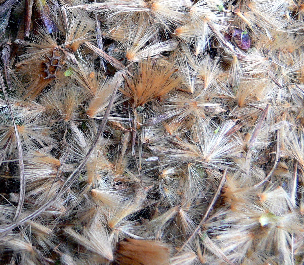 Le platane (Platanus × hispanica) produit une grande quantité de graines qui ne tombent au sol qu'au printemps ; ici le 13 mars 2008 à Lille (France). Beaucoup tombent sous l'arbre. certaines sont transportées par les pluies et moindrement par les coups de vent.